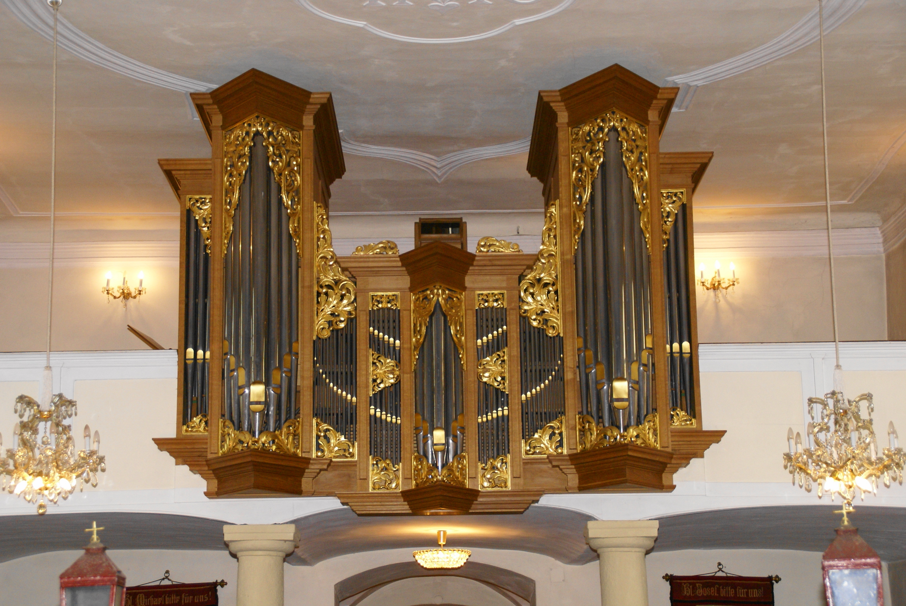 Orgel der Pfarrkirche von Statzendorf, Diözese St. Pölten, Niederösterreich